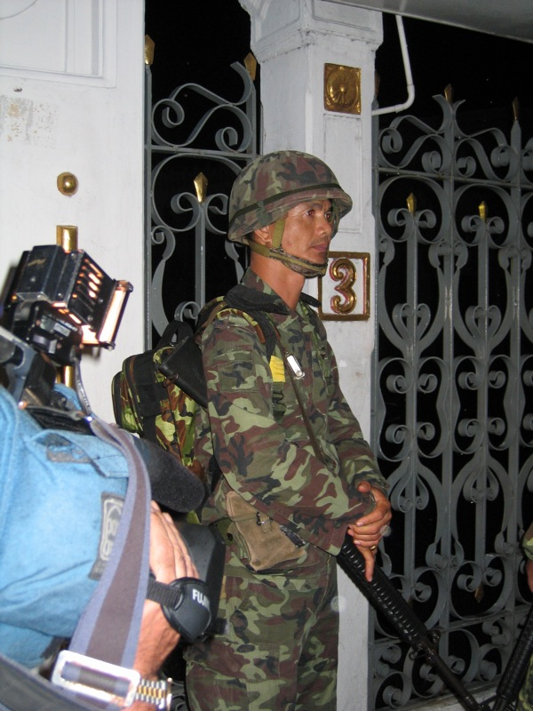 Golpe de Estado Tailandia. Militar en la puerta de la sede de gobierno / Thailand Coup attemp